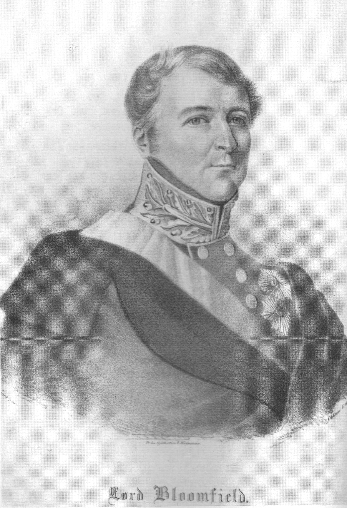 Benjamin Bloomfield (1768-1846)